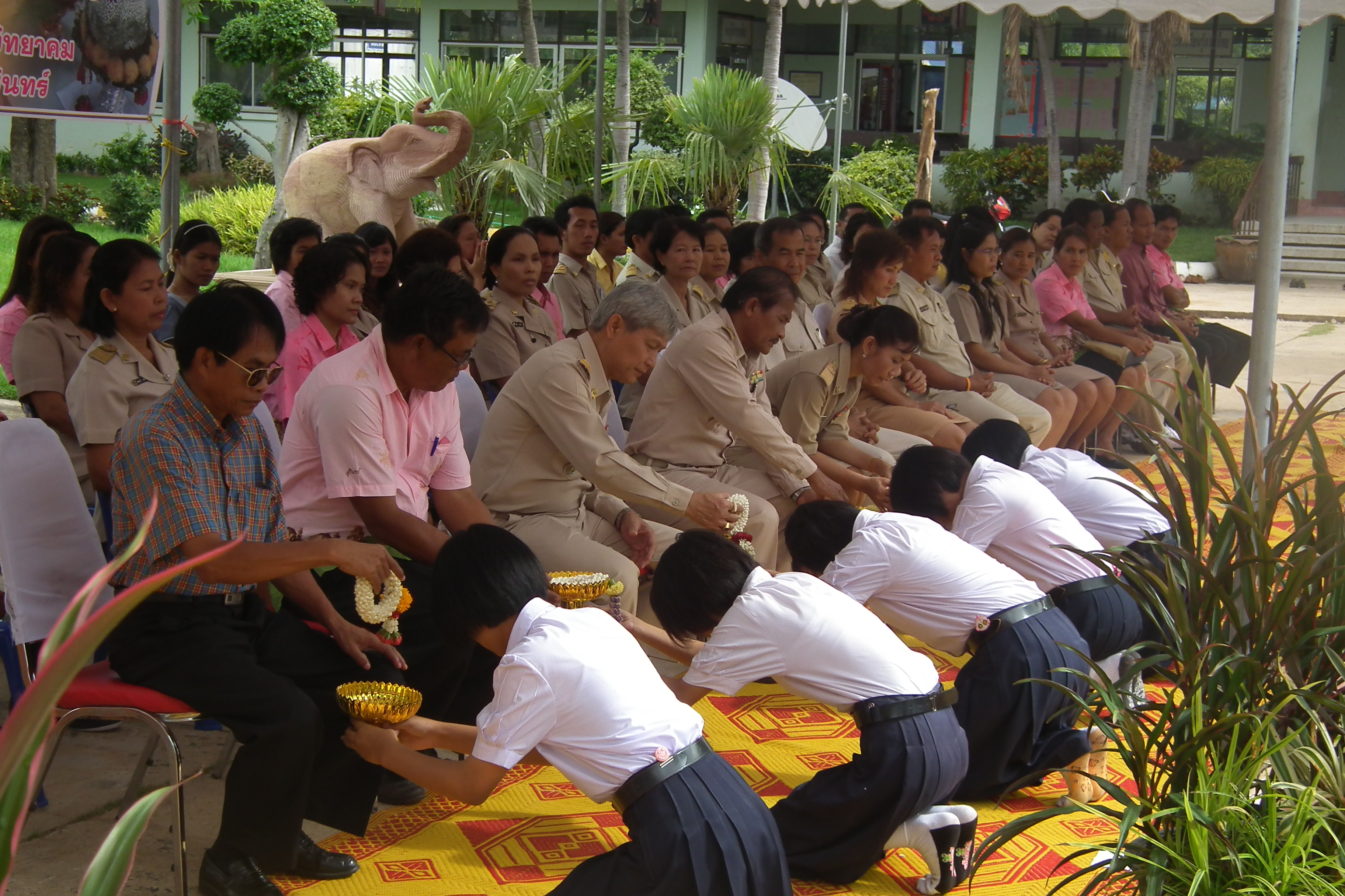 พิธีไหว้ครูปีการศึกษา 2553